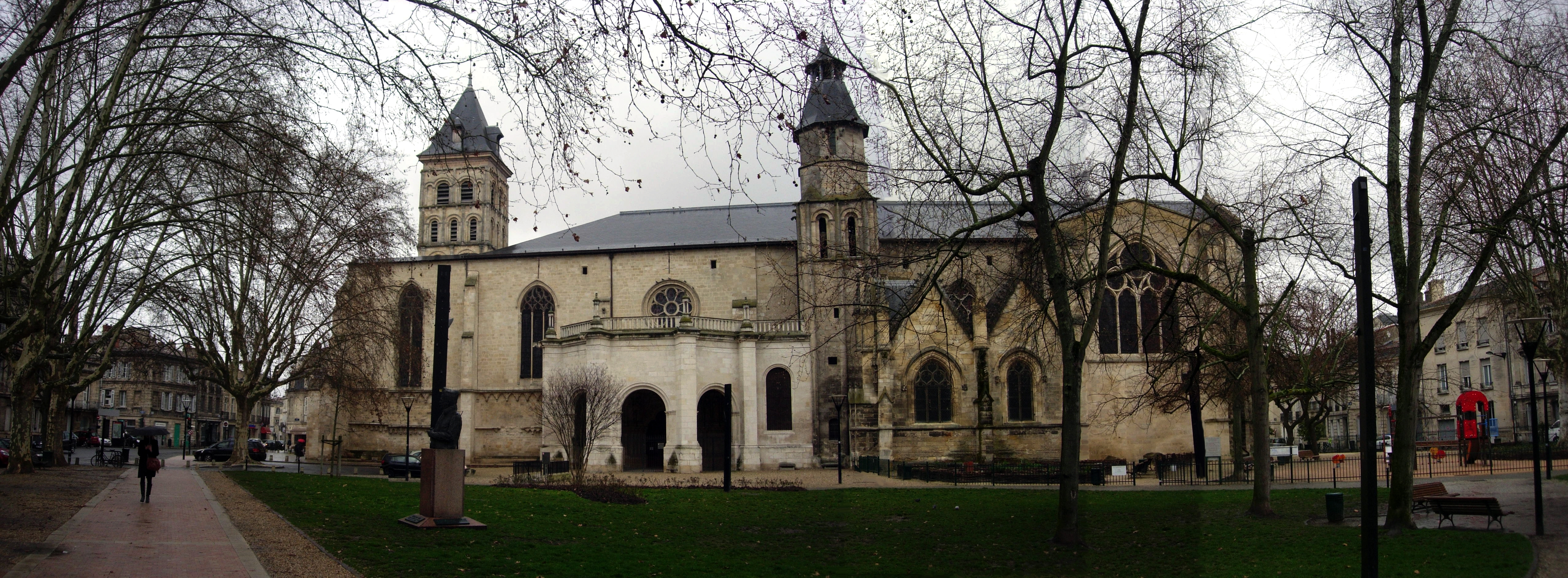 La basilique Saint-Seurin de Bordeaux vue depuis la place des Martyrs de la Résistance. .